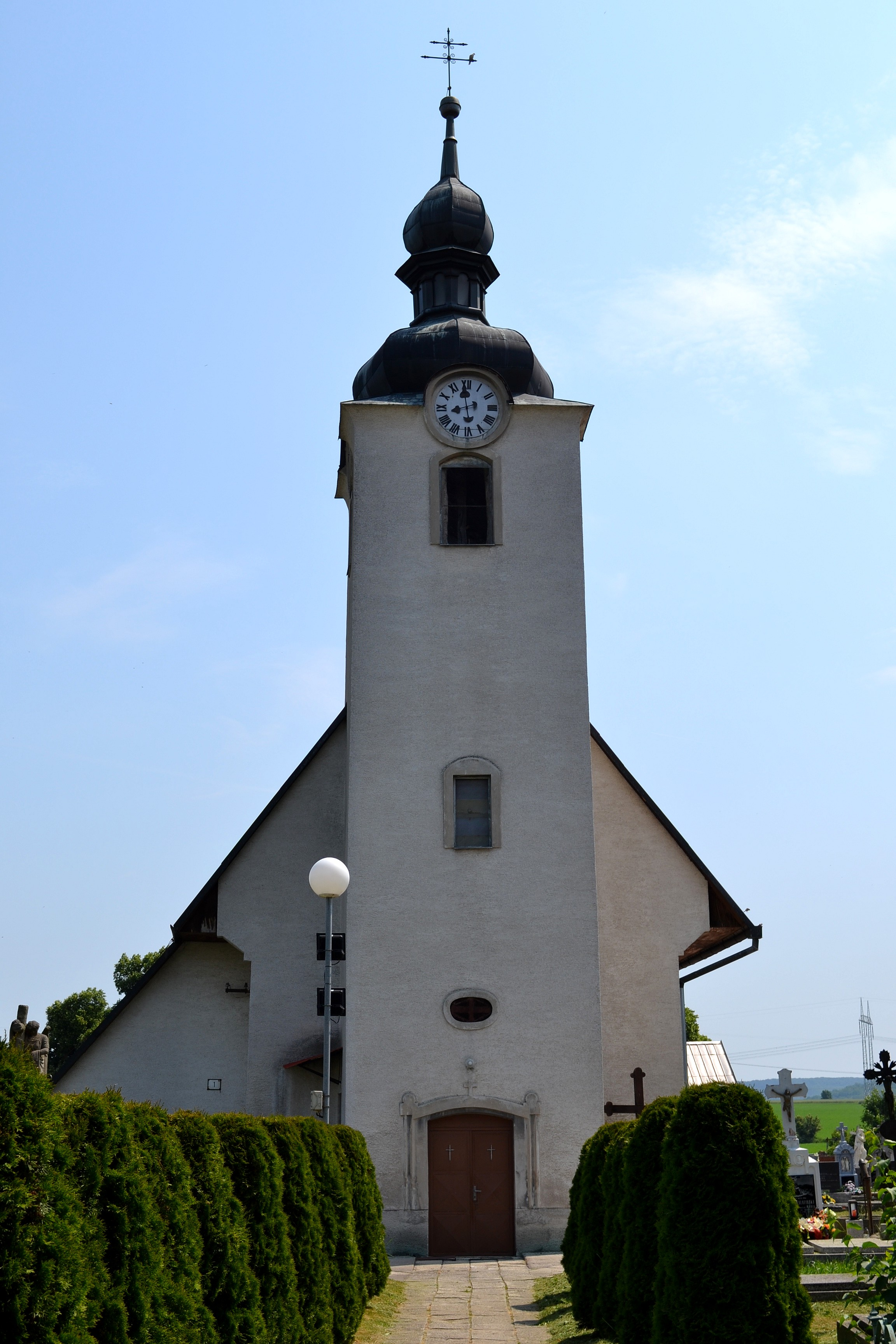 Osuské, Kostol Všetkých Svätých; veža kostola